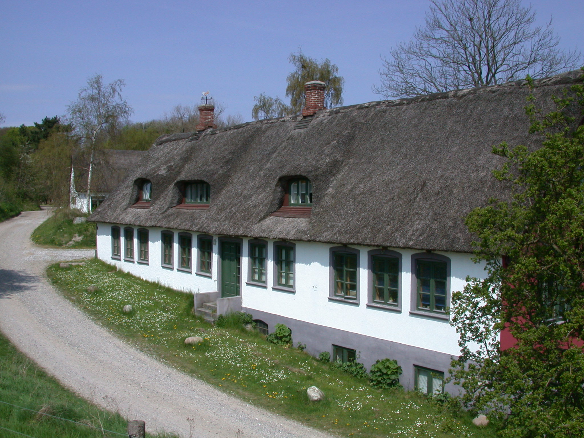 Molslaboratoriet, Nedre Strandkær